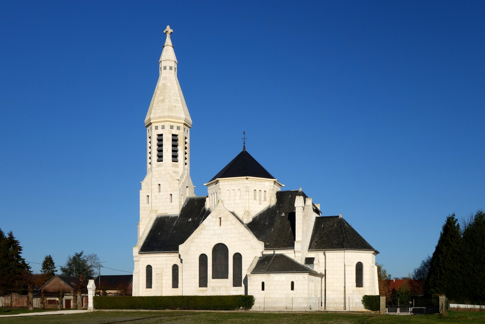 Eglise